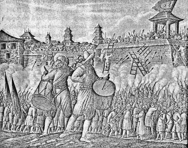 荷蘭軍隊進攻金門城，1663年(取自John Ogilby 的 Atlas chinensis,，1671年)